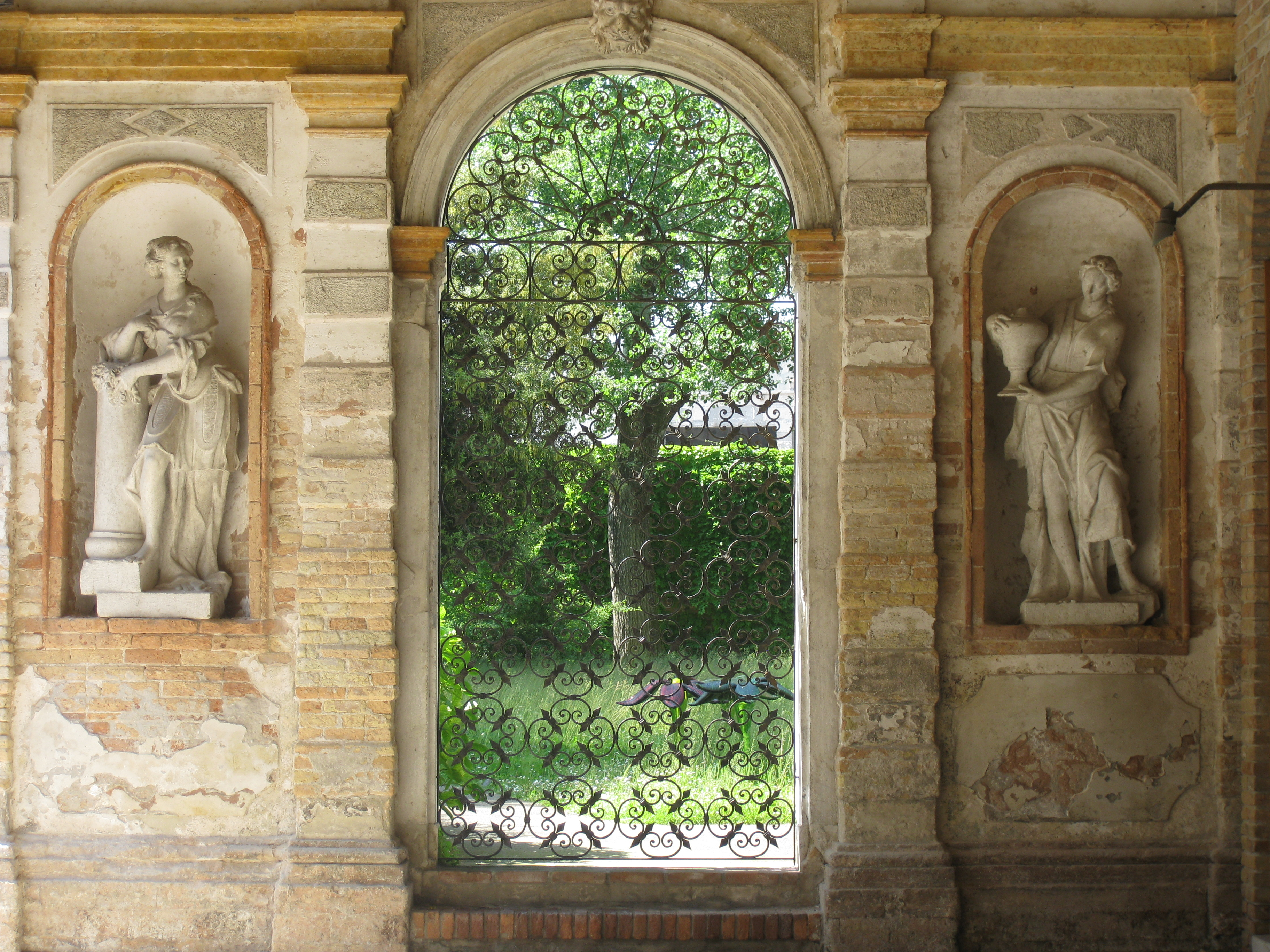 Murano מורנו